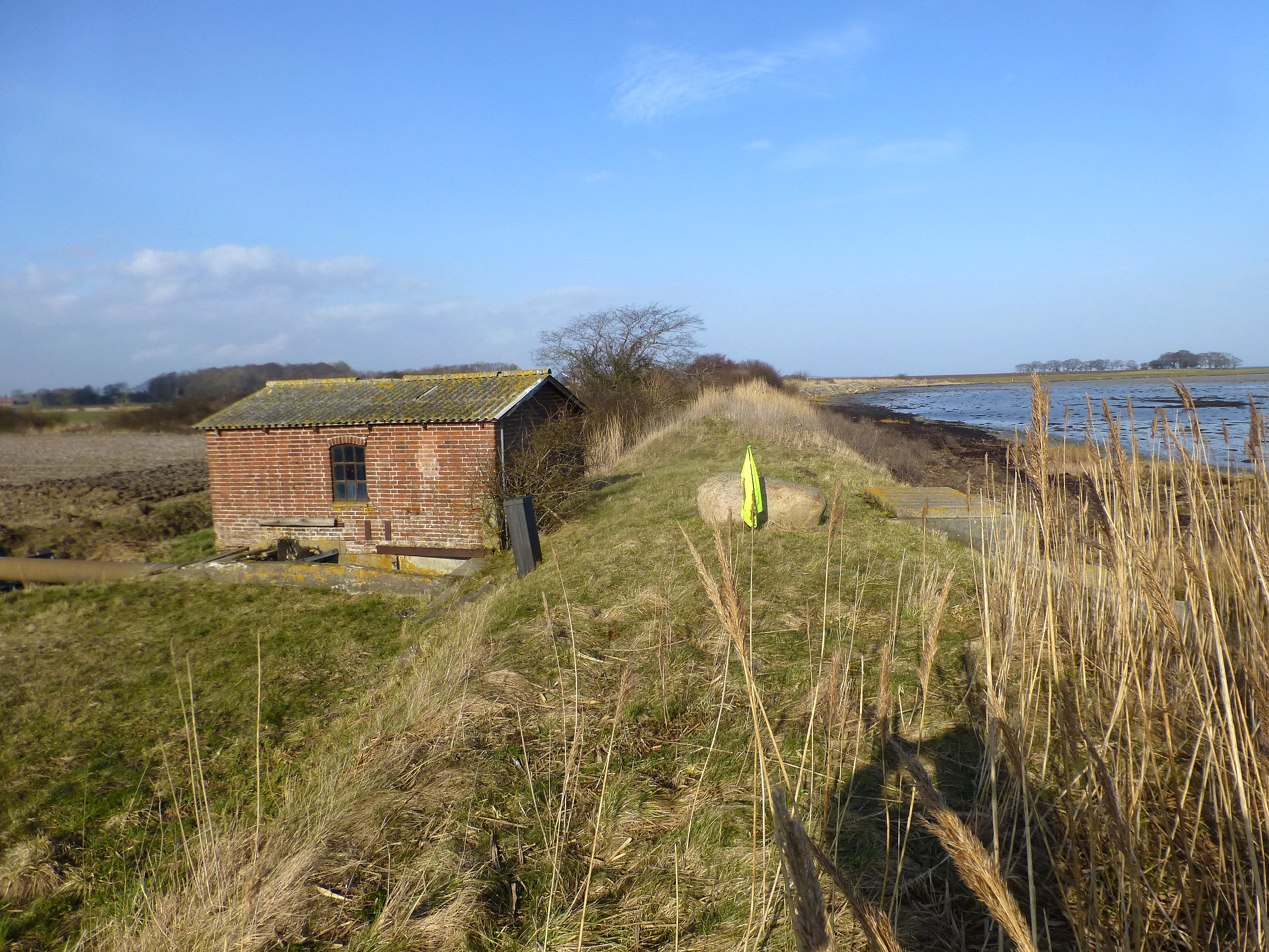 Dige og pumpehus ved Maden Gyllingnæs